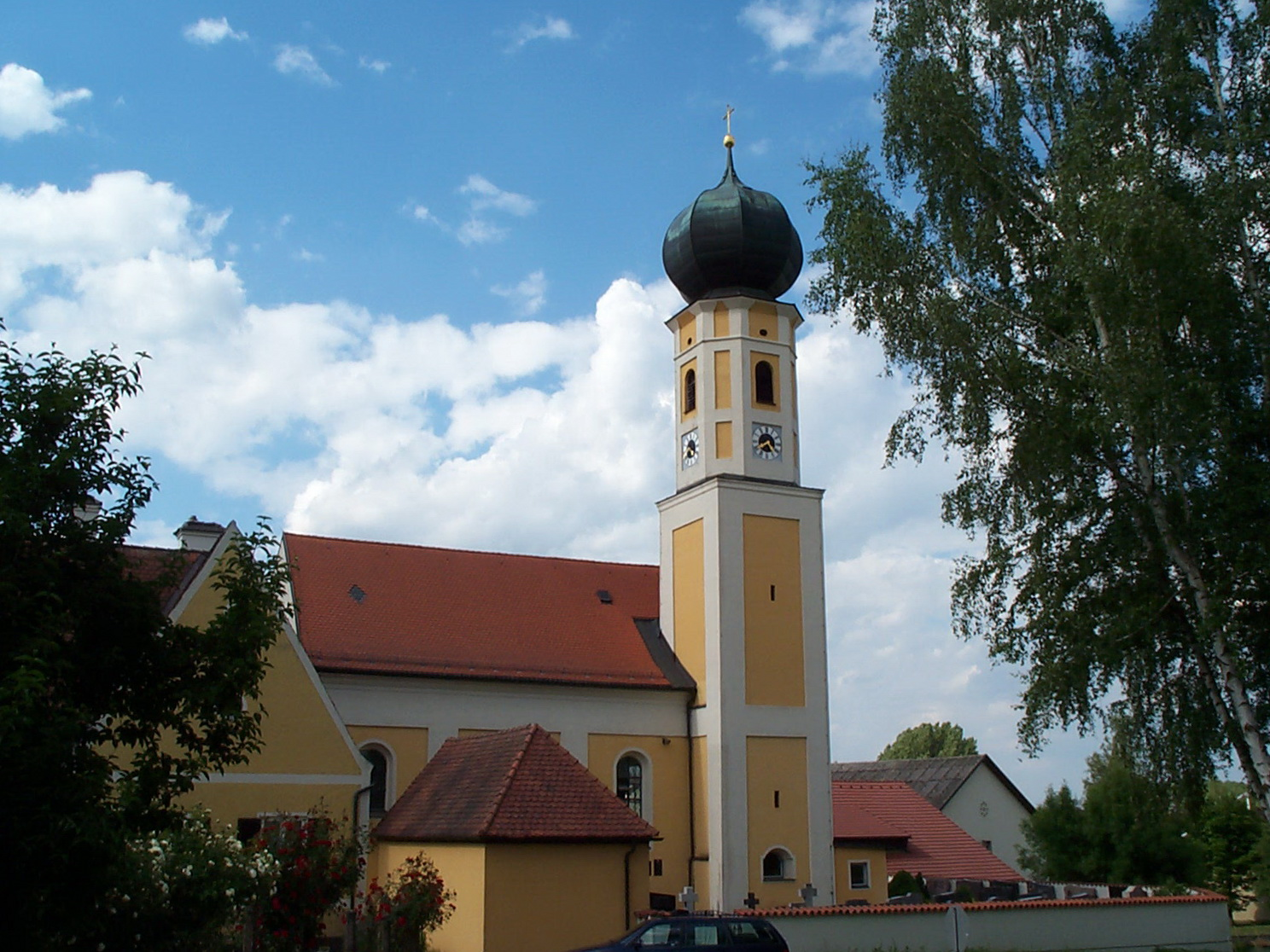 Inkofen, Hofmark 2. Kath. Pfarrkirche S. Jakobus d. Ä., Saalbau mit eingezogenem Chor, Flankenturm mit Zwiebelhaube und Putzgliederungen, 1719-23 anstelle der alten Schlosskirche.